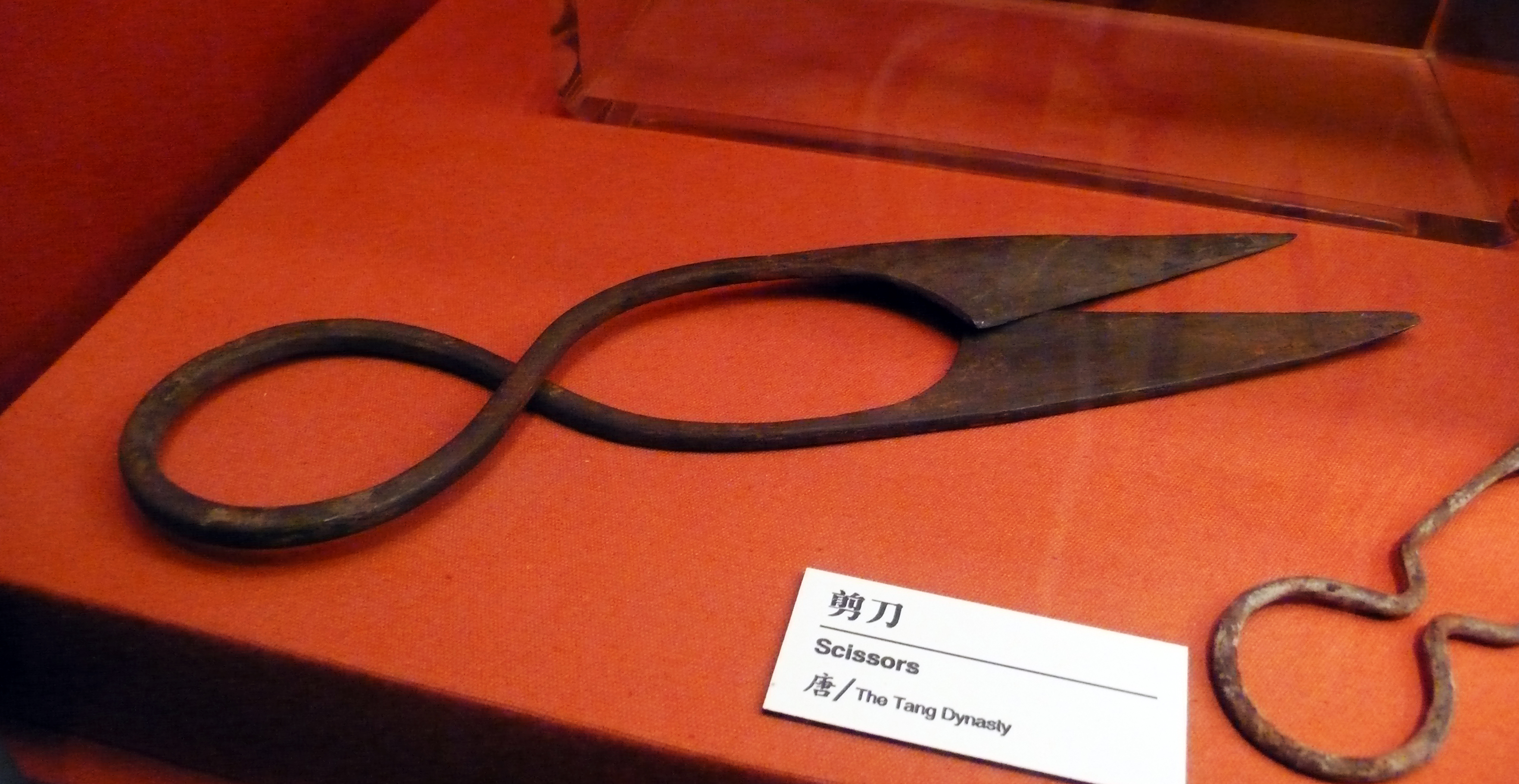 中国刀剪剑博物馆藏。